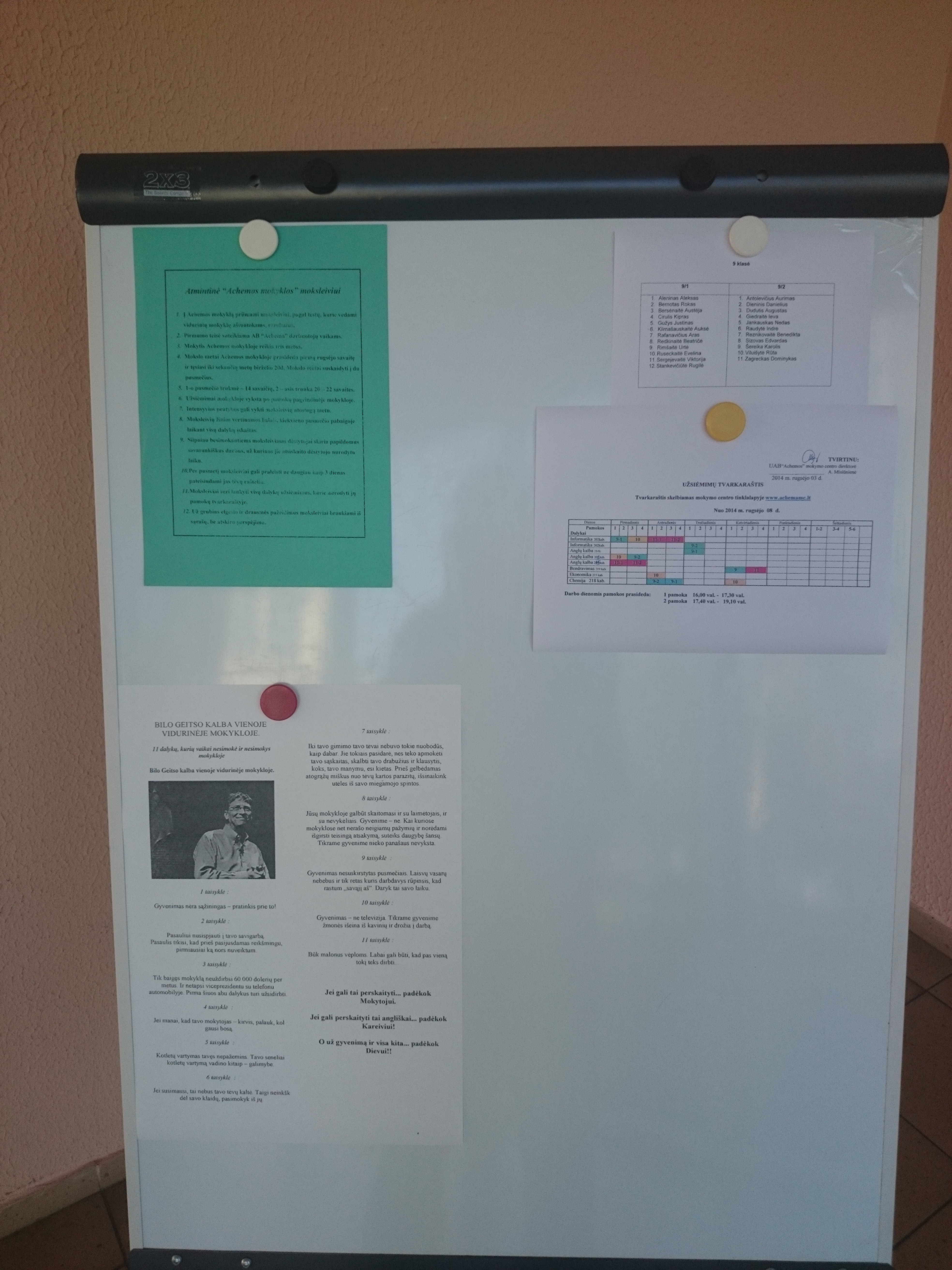 Achemos mokymo centras